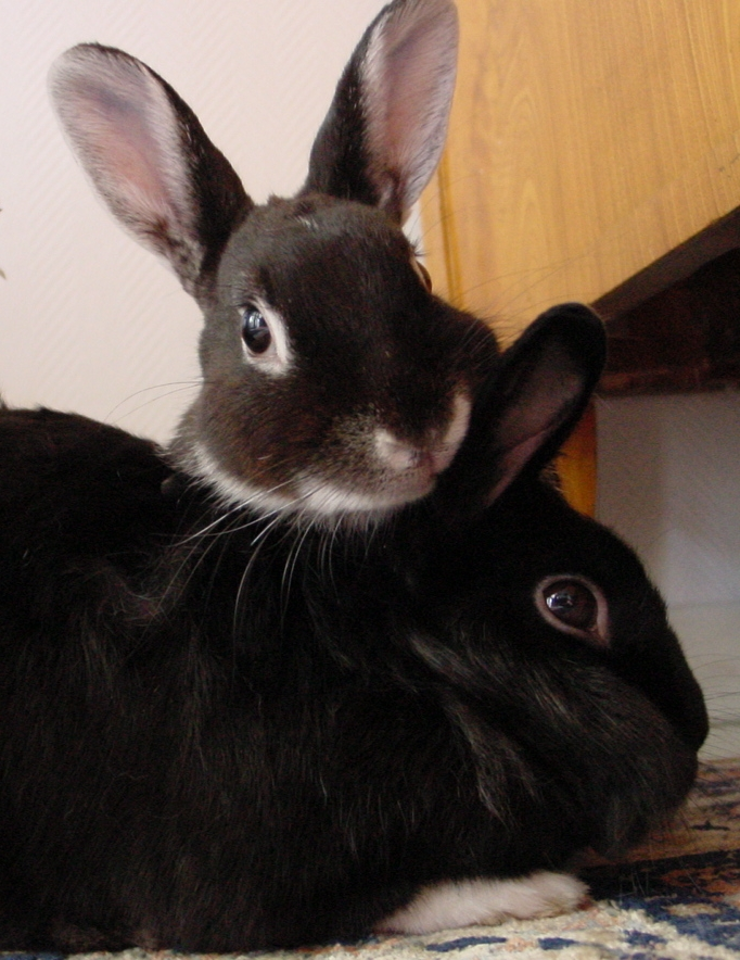 2 Kaninchen (Hermine geb. ca. 2003-2004, genaueres unbekannt, da auf einem Einkaufsmarktparkplatz gefunden & Hermann geb. ca. 2003, genaueres unbekannt, da aus dem Tierheim und dort unbekannt, da im Schnee aufgefunden.) Hermine geb. ca. 2003-2004